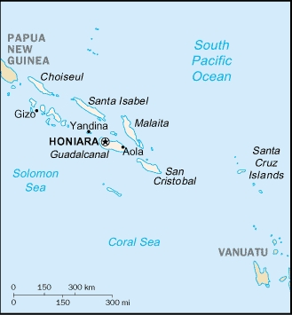 Lage von Honiara